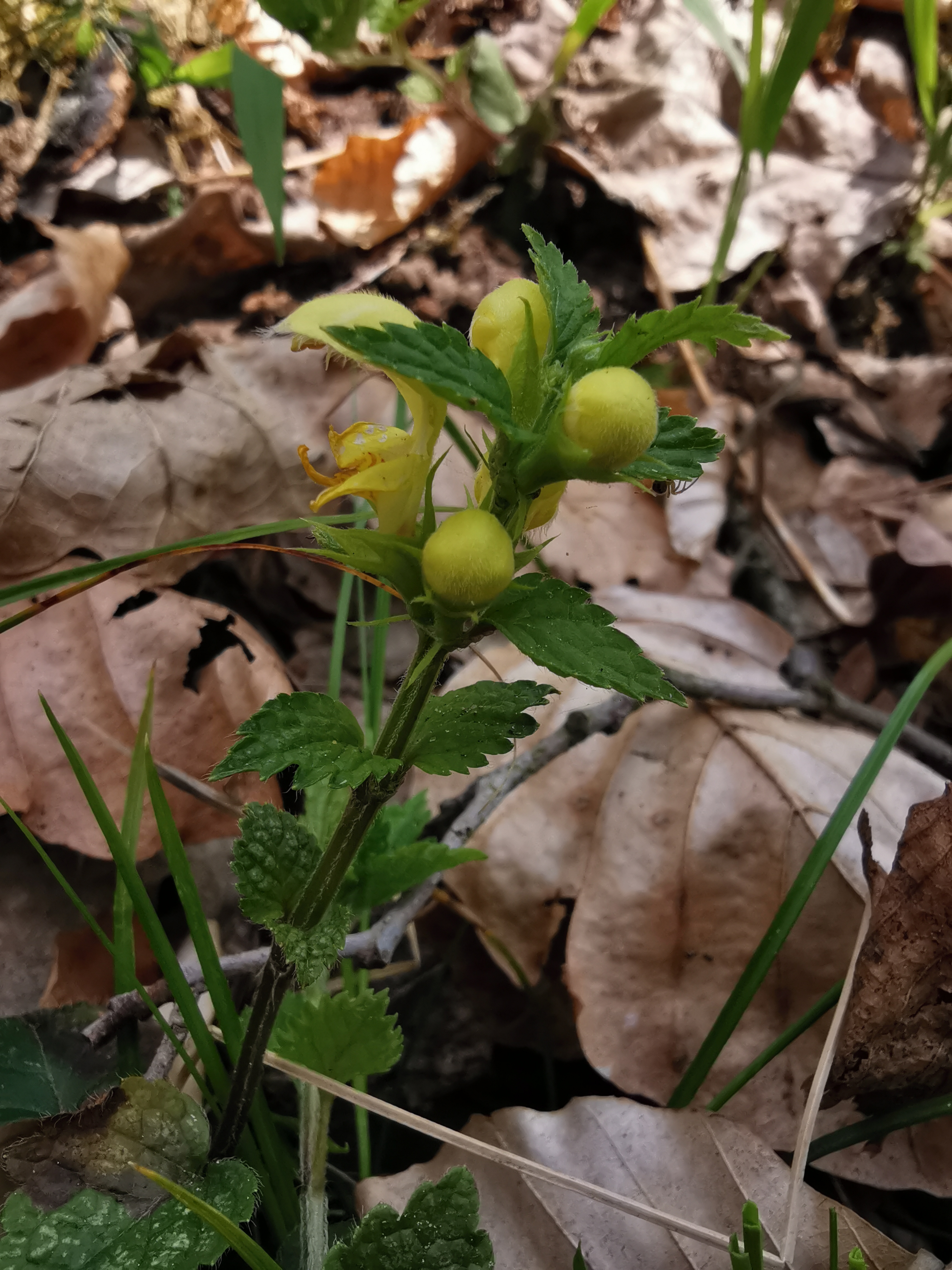 Gajowiec żółty nad Żelkową Wodą